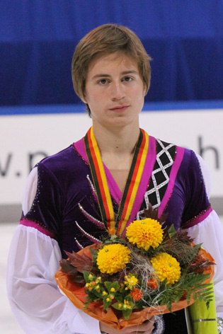 Gordei Gorshkov (RUS) at the 2009-2010 JGP Pokal der Blauen Schwerter.